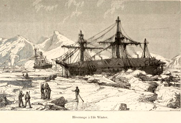 Arthur Mangin, Voyages et Découvertes outre-mer au XIXe siècle, illustrations par Durand-Brager, 1863 ː Édouard Parry à l'île Winter.